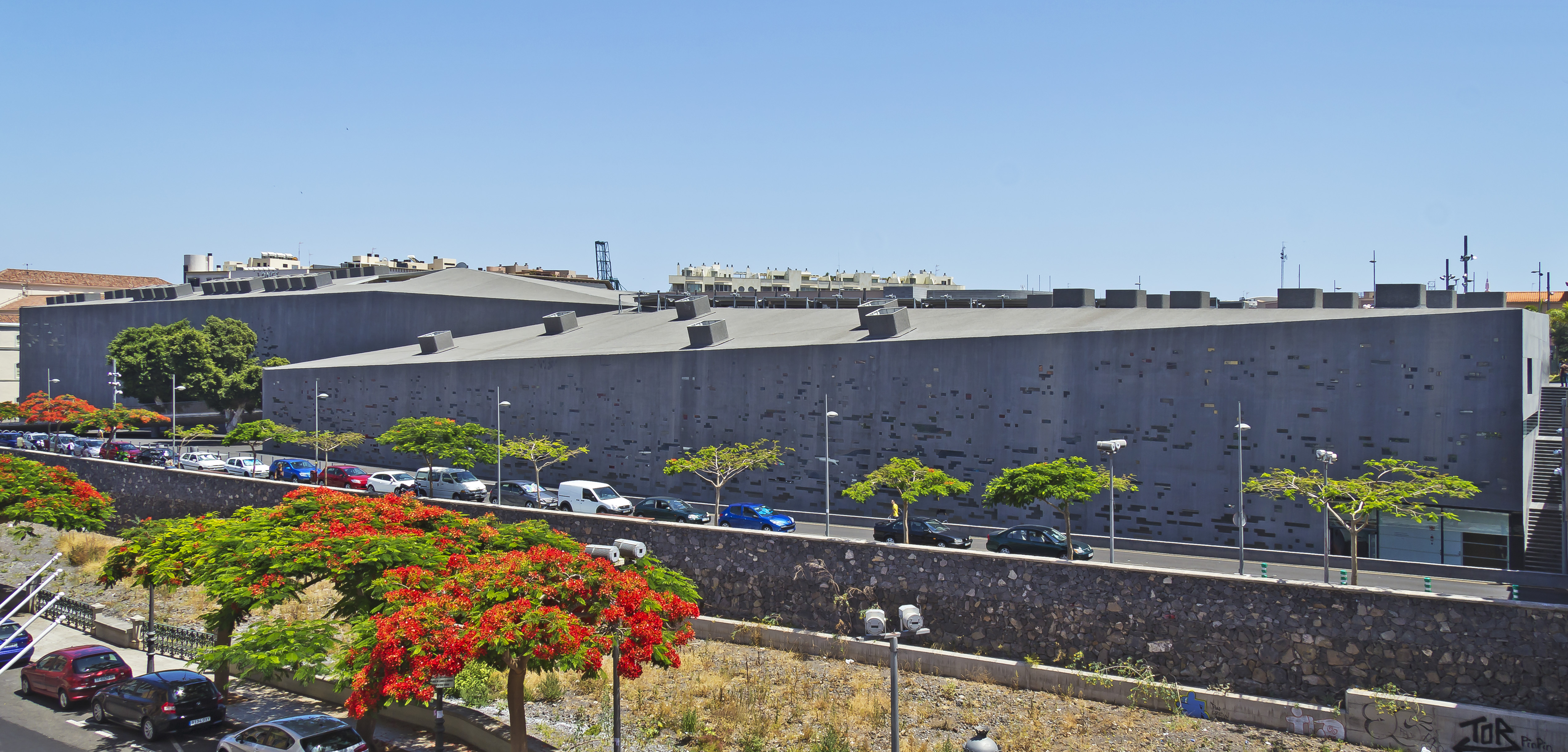 Das TEA (Tenerife Espacio de las Artes) in Santa Cruz de Tenerife, Blick von der Brücke General Serador